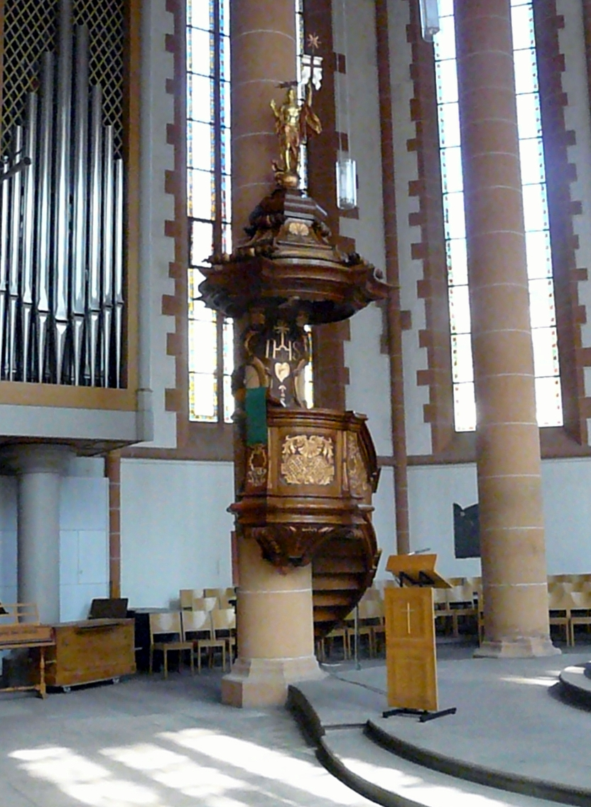 Kanzel in der Heidelberger Heiliggeistkirche